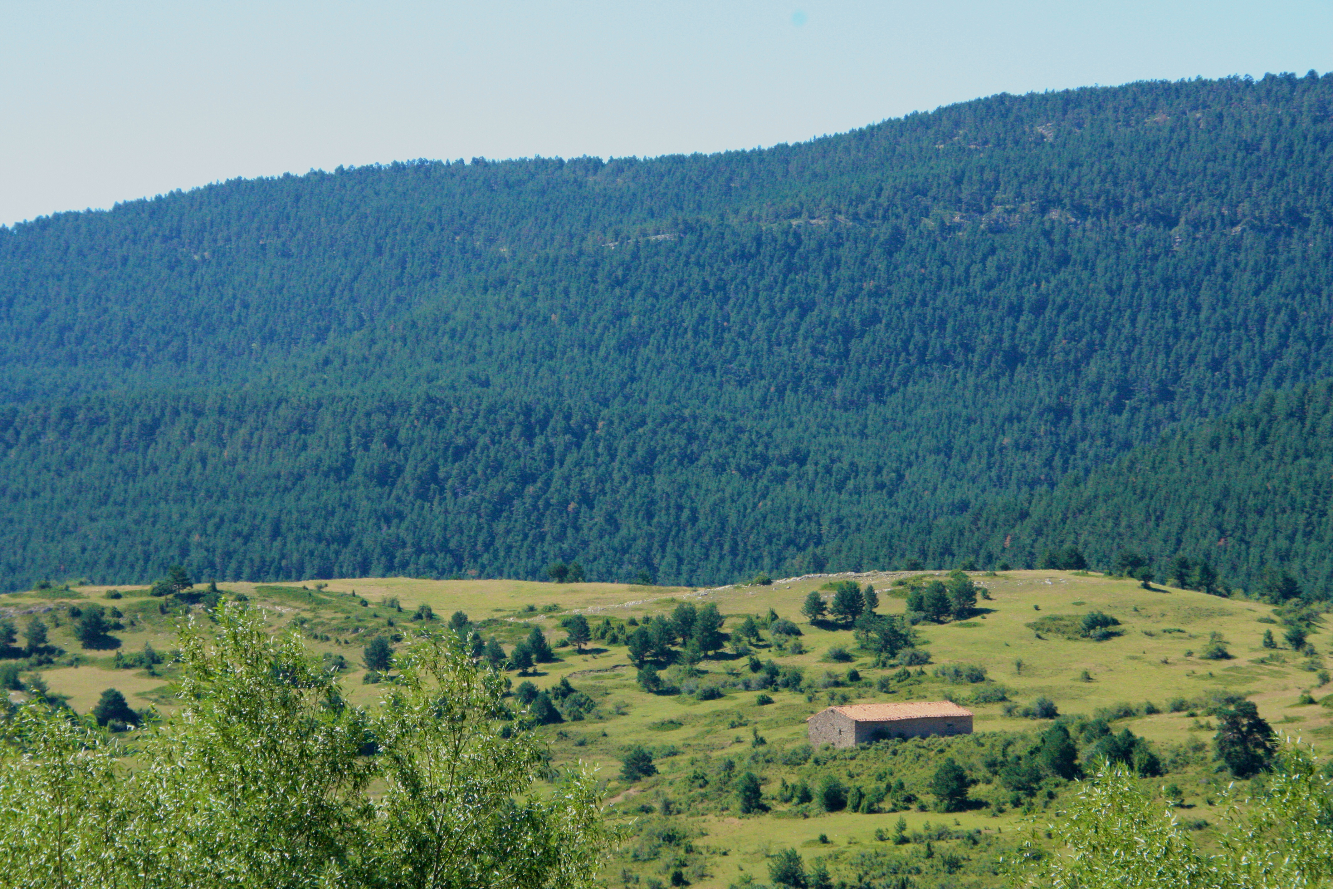 Valdelinares